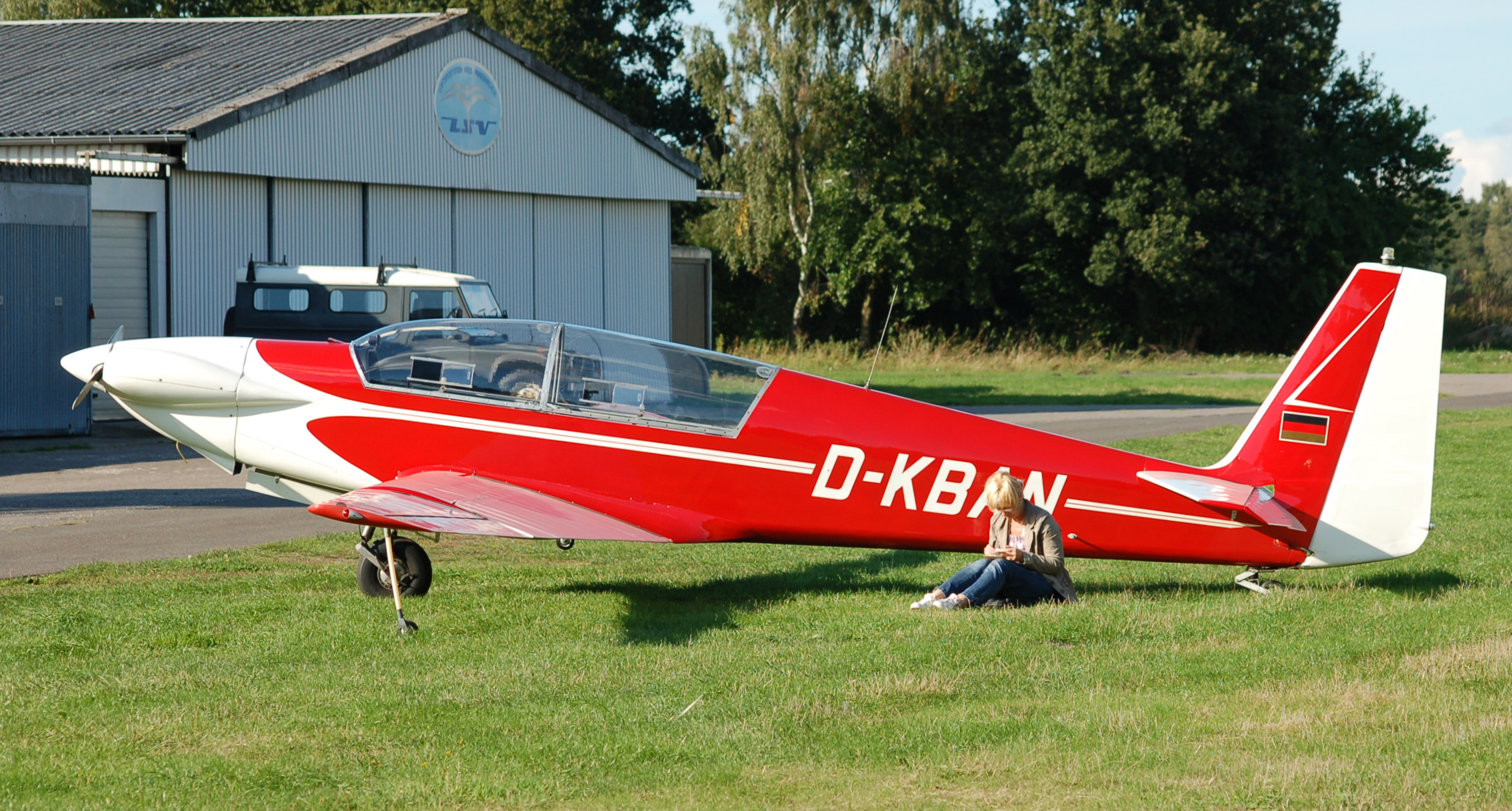 Fournier RF 5, Baujahr 1970 (D-KBAN) auf dem Flugplatz Uetersen